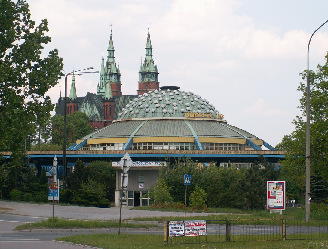 Bus Station (Kielce, Poland)